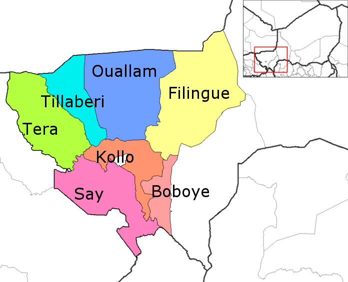 Tillaberi Arrondissements